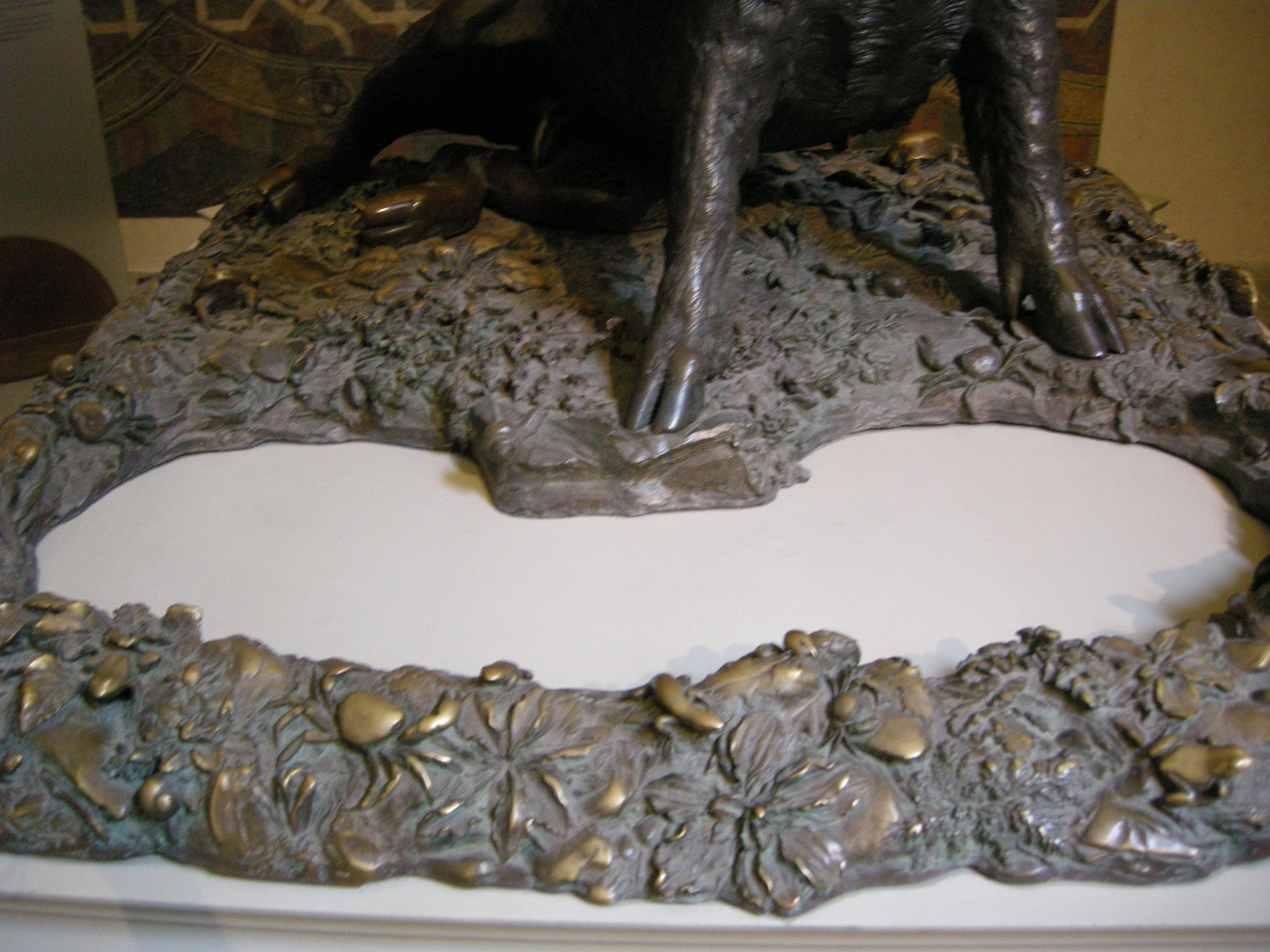 Porcellino di pietro tacca, base, originale